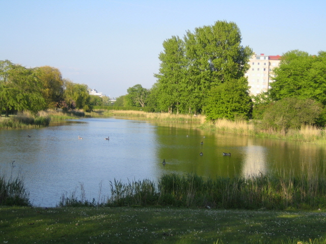 Damm i Öresundsparken, Malmö. Bilden tagen av mig själv 19 maj 2005.